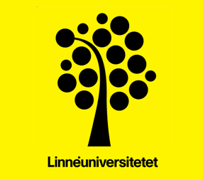 Logo